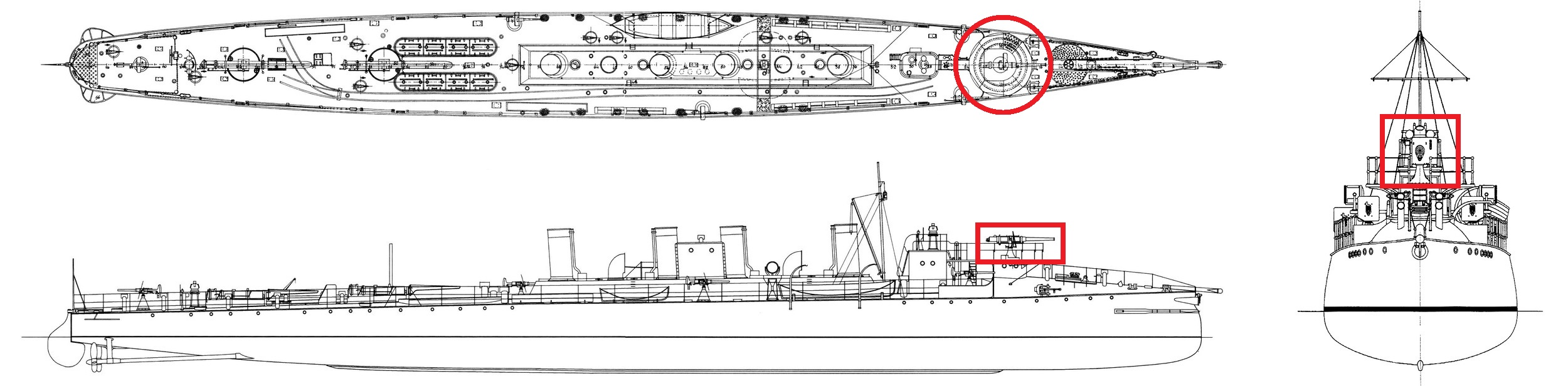 Создано по материалам архивов РГАВМФ (Ф. 421, Оп.12)